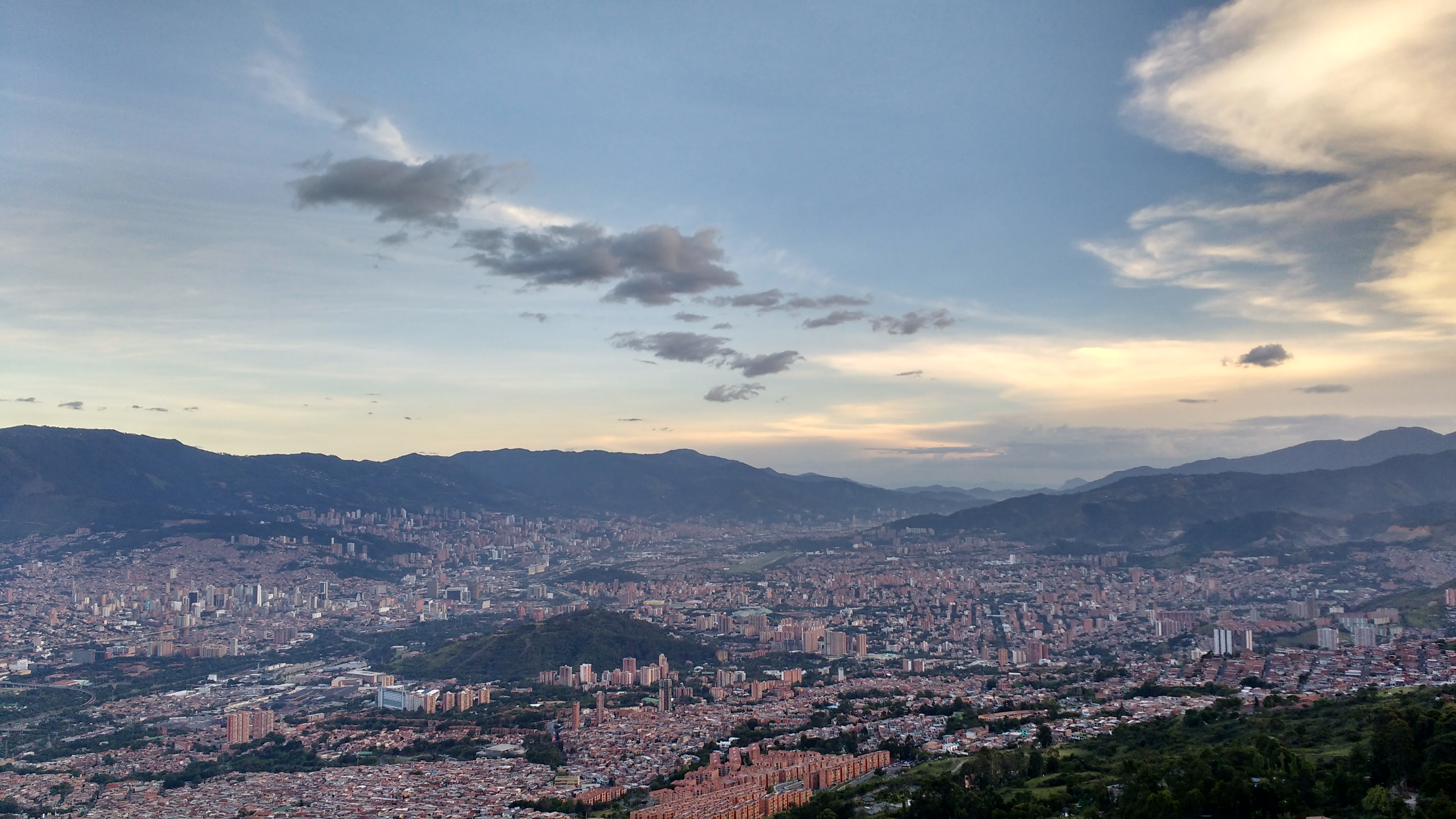 Panorámica del Valle del Aburrá y las montañas circundantes en una tarde soleada desde el Cerro El Picacho